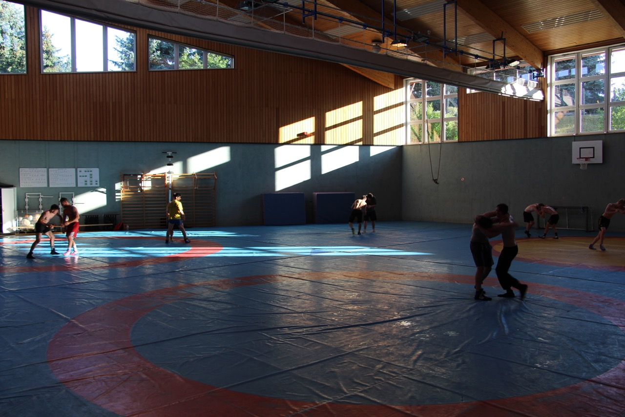 Die Mattenhalle des 1. LSC